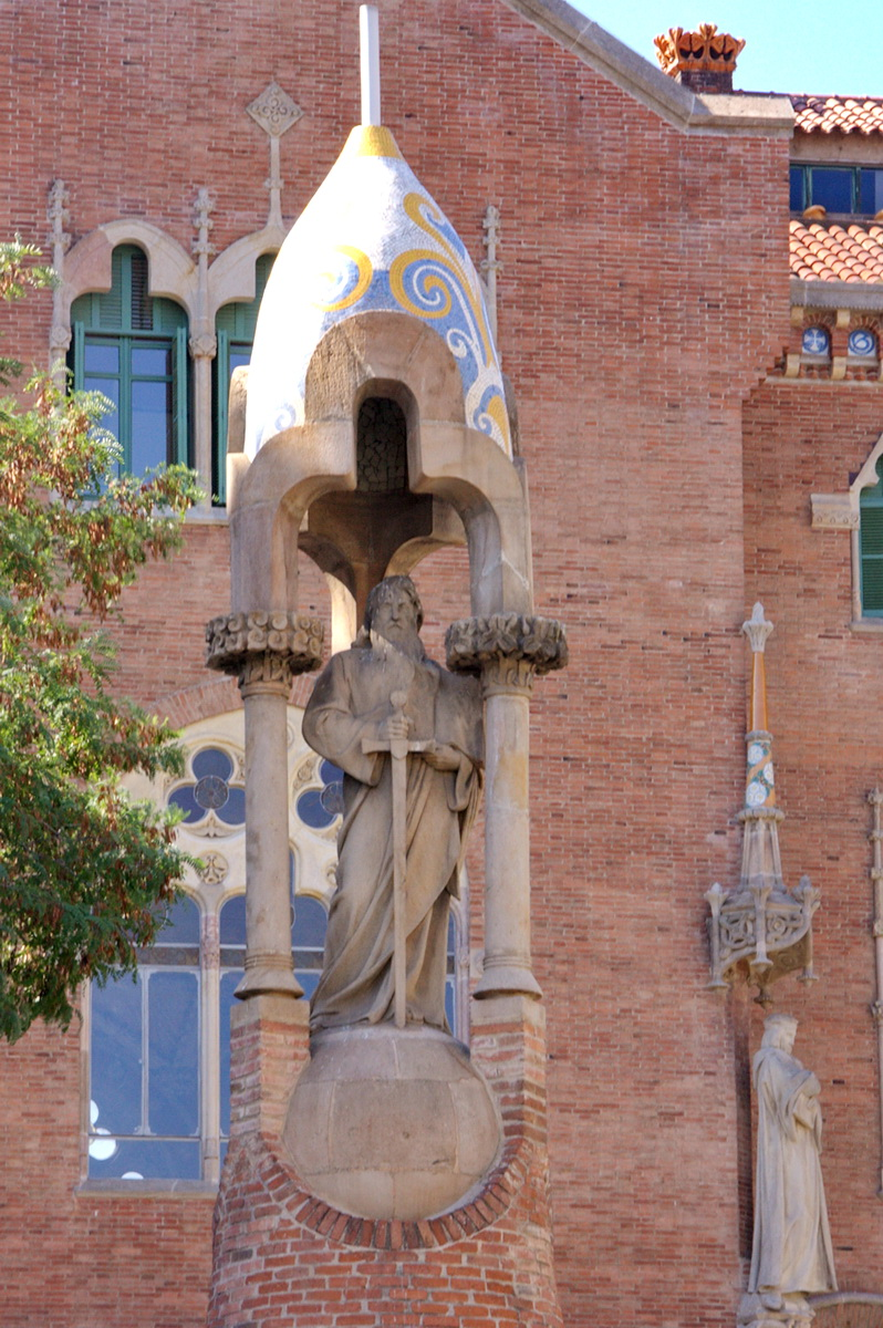 Sant Pau a l'accés principal al recinte de l'hospital de Sant Pau, obra modernista de Domènech i Montaner de 1905-1913 (Barcelona, Catalunya). L'escultura és obra d'Eusebi Arnau